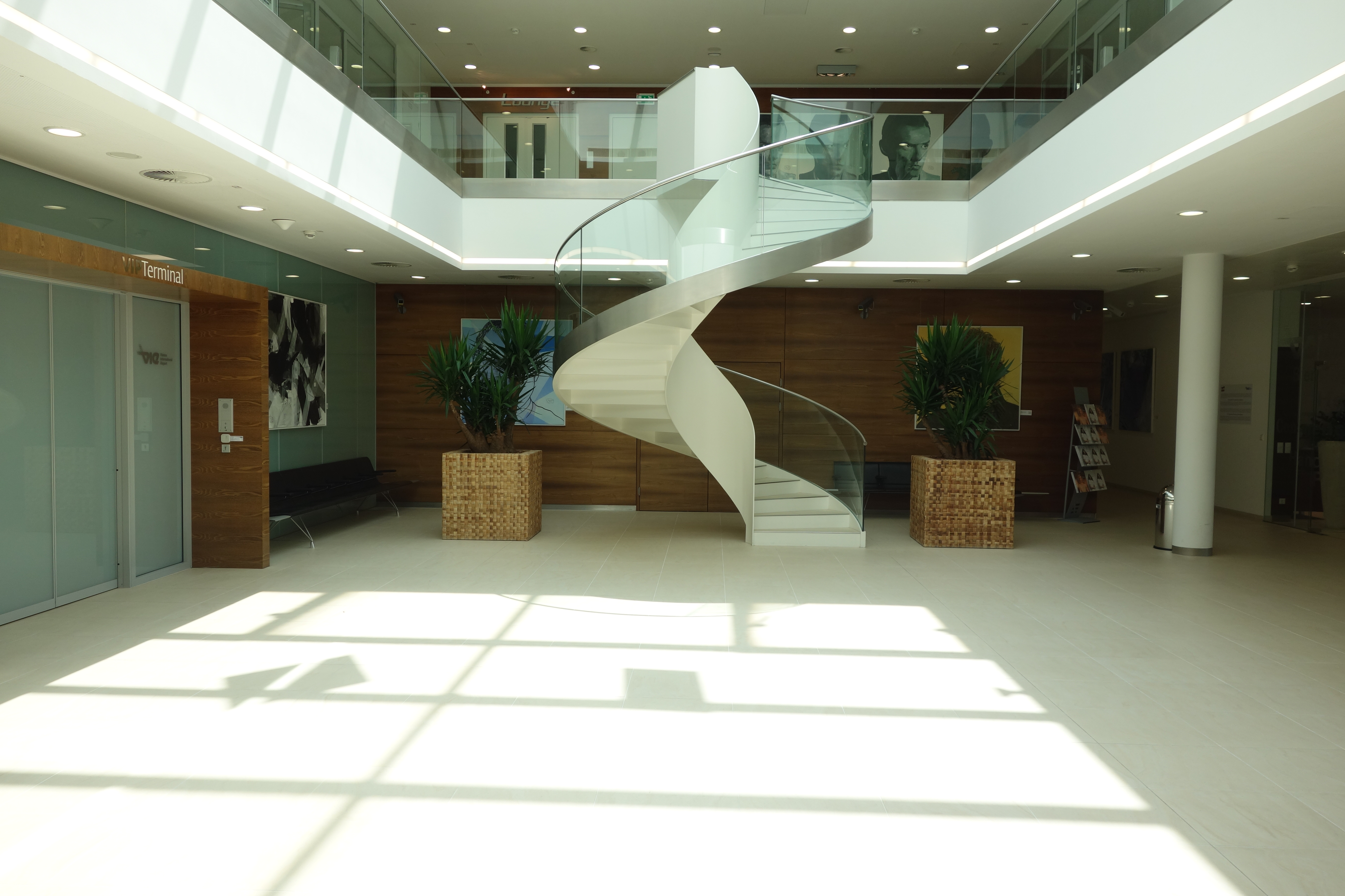 Innenansicht des VIP-GACs am Flughafen Wien im Juli 2014. Die Aufnahme zeigt das zentrale Foyer, links im Bild der Eingang zum VIP-Bereich.